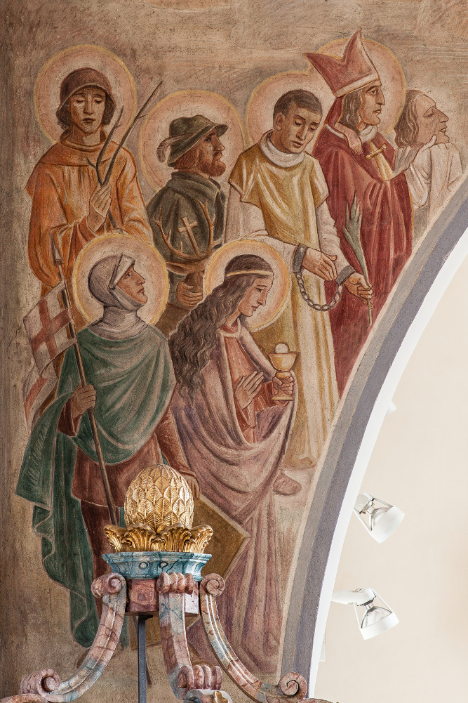 Freskoausschnitt Nothelfer in der St. Laurentius-Kirche in Alzenau-Michelbach